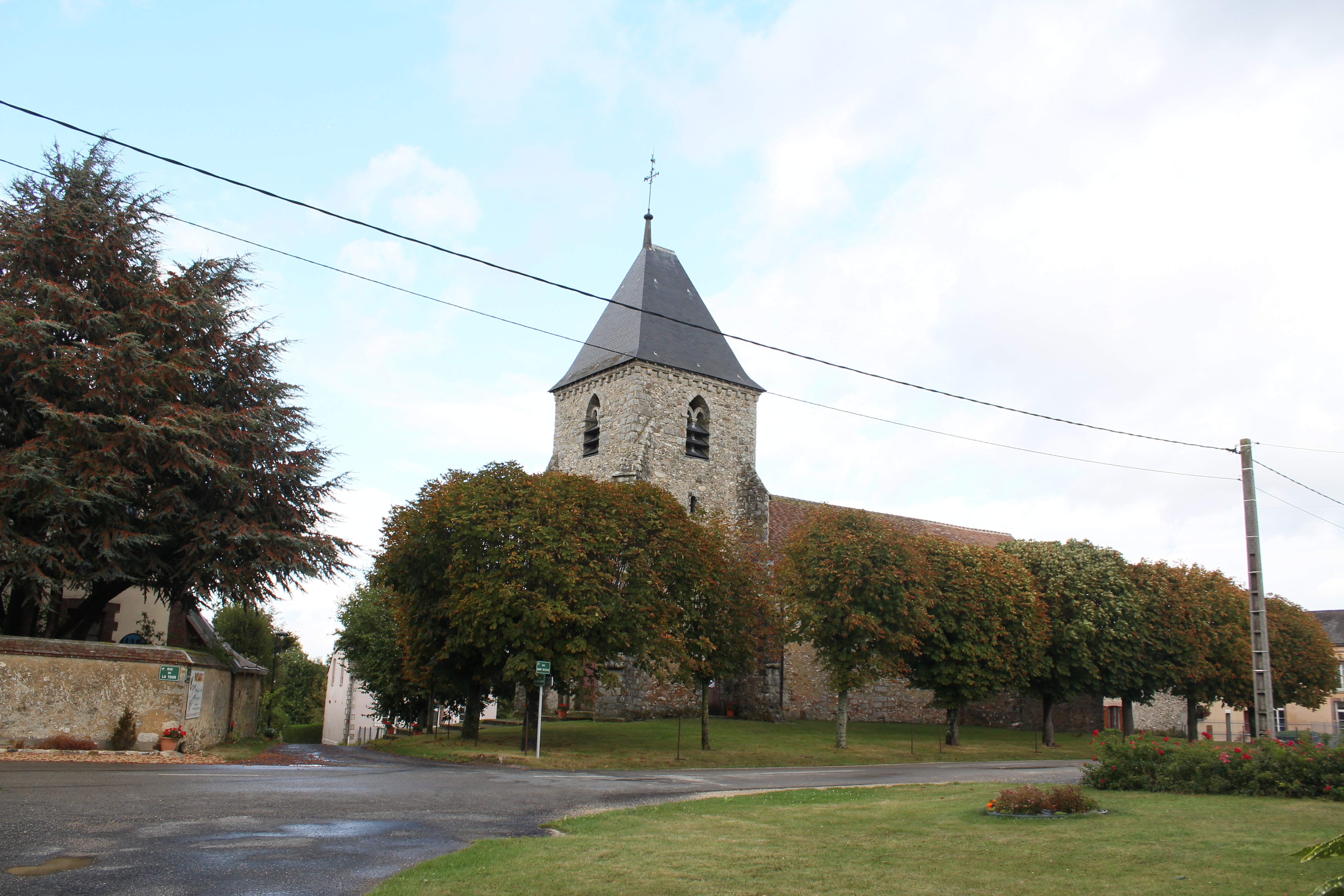 Église de La Villeneuve-lès-Charleville, (Classé, 1916) .